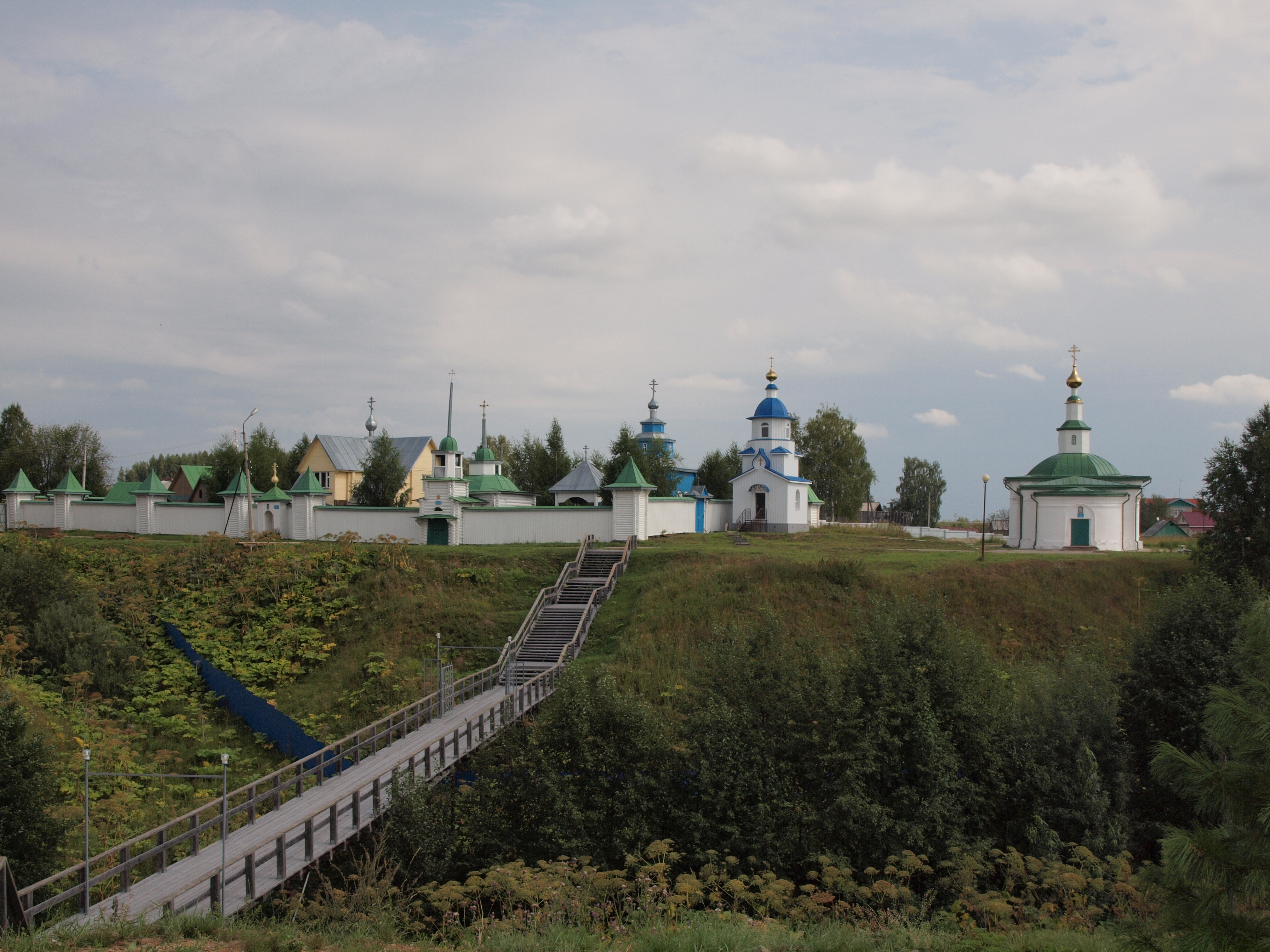 Церковь Михаила Архангела: Усть-Вымь, Усть-Вымский район, республика Коми